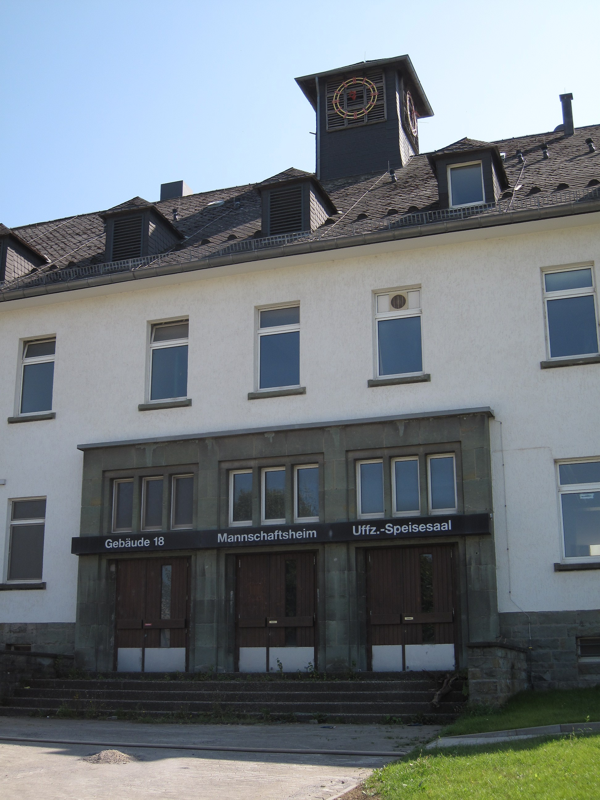 Gebäude 18 (ehemaliges Mannschaftsheim und Uffz.-Speisesaal) der Blücher-Kaserne in Hemer.